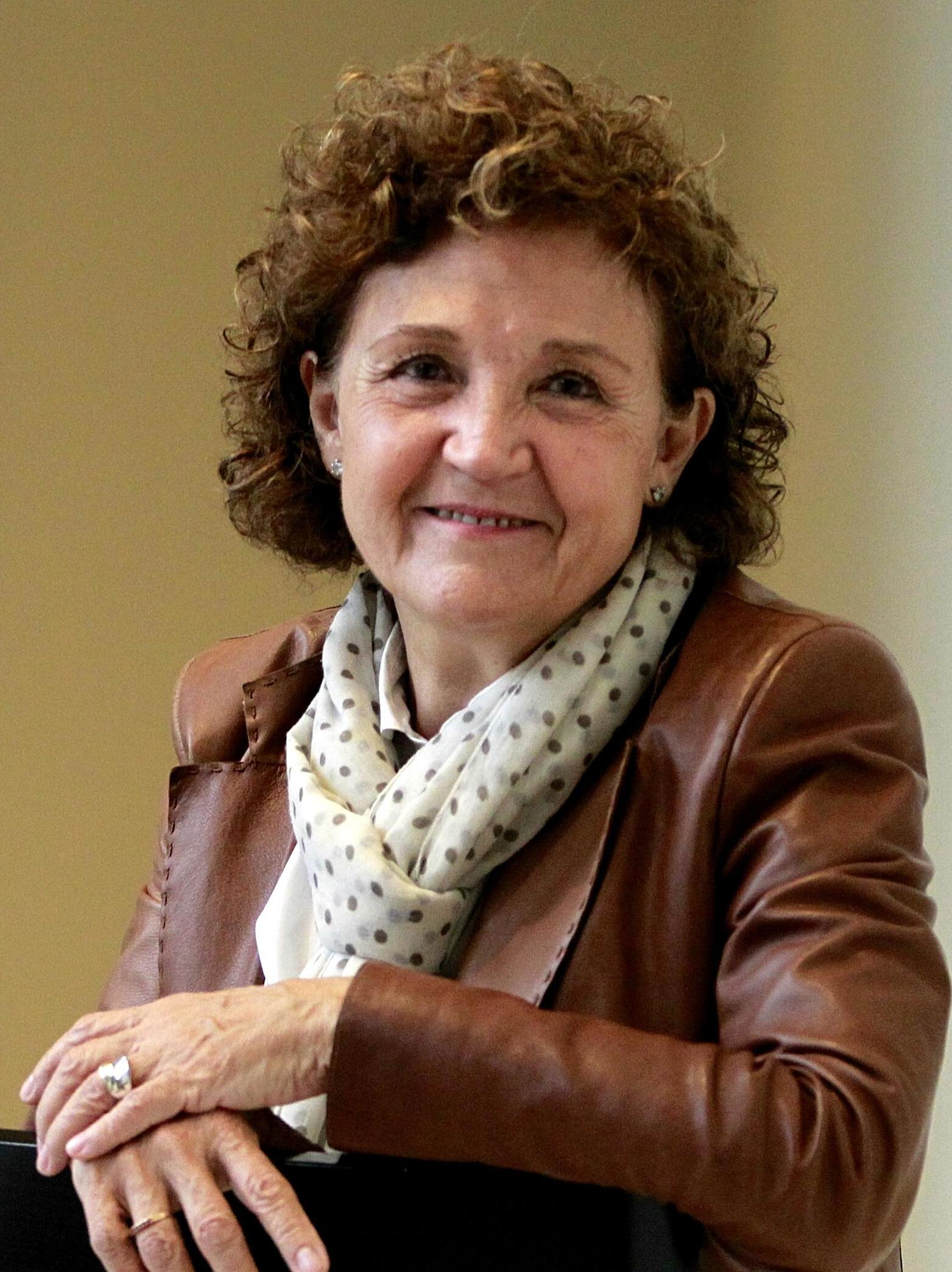 "Si observamos lo que ha hecho el PP con Canal 9 y Telemadrid, no sería descabellado pensar que con José Antonio Sánchez pueda haber una reestructuración en TVE que la deje bajo mínimos", dice la ex directora general de RTVE con Zapatero. "Siempre he mantenido la tesis de que fui a Radiotelevisión a inmolarme, a cambiar el modelo", asegura Caffarel. "También sufrí presiones. Todas las personas que trabajan en algún medio saben que hay presiones, no sólo del Gobierno, también de los partidos, de los sindicatos….", admite la catedrática, alejada ahora de la vida pública